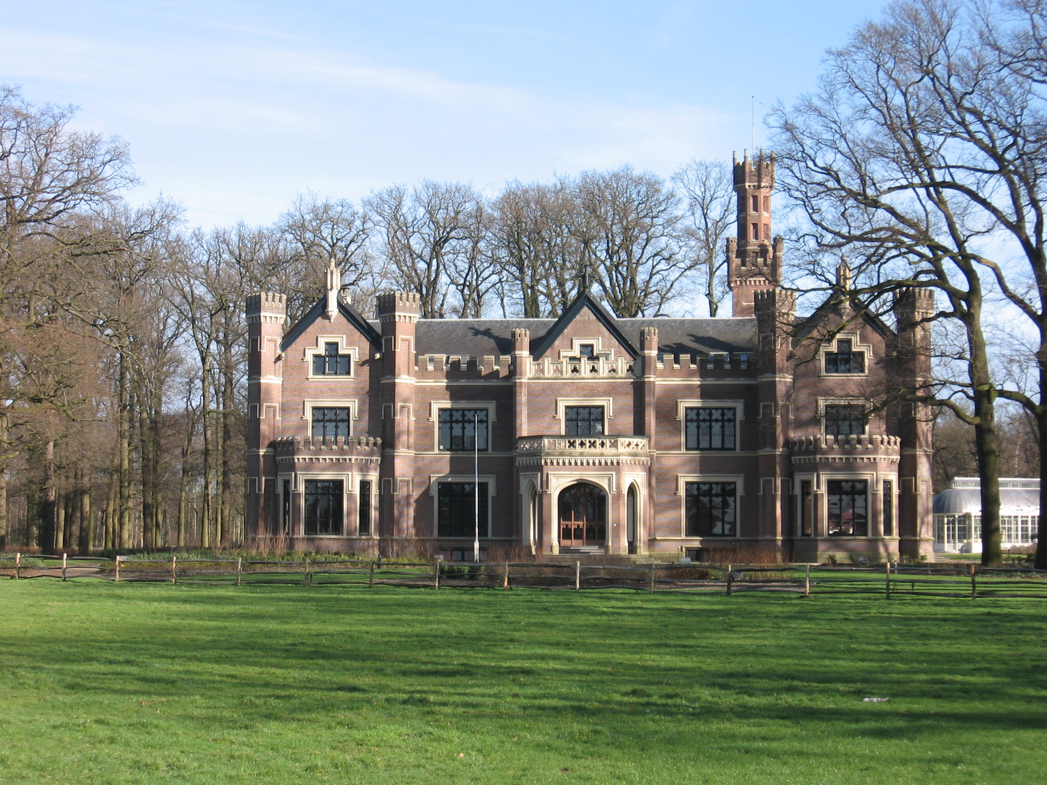 Barneveld